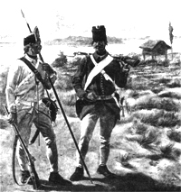 Граничар пешак и граничар стрелац испред граничарског чардака 1700-1798 Др. Душан Вулетић, Војна граница - кроз старе планове и графичке приказе, Сремска Митровица, 1996.